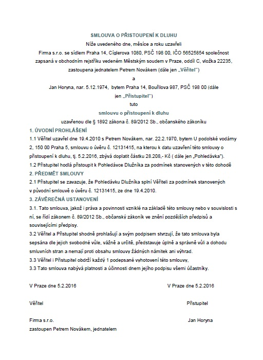 Smlouva o přistoupení k dluhu.